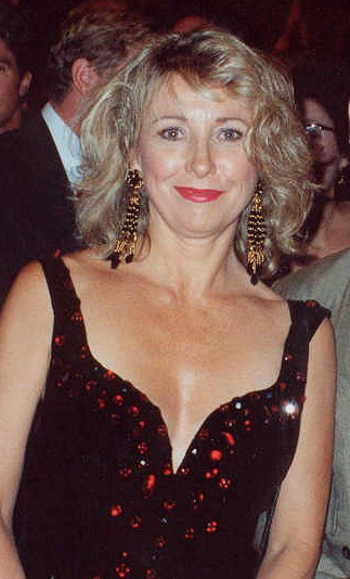 Teri Garr AIDS Project Los Angeles (APLA) benefit, Los Angeles- Sept. 1990